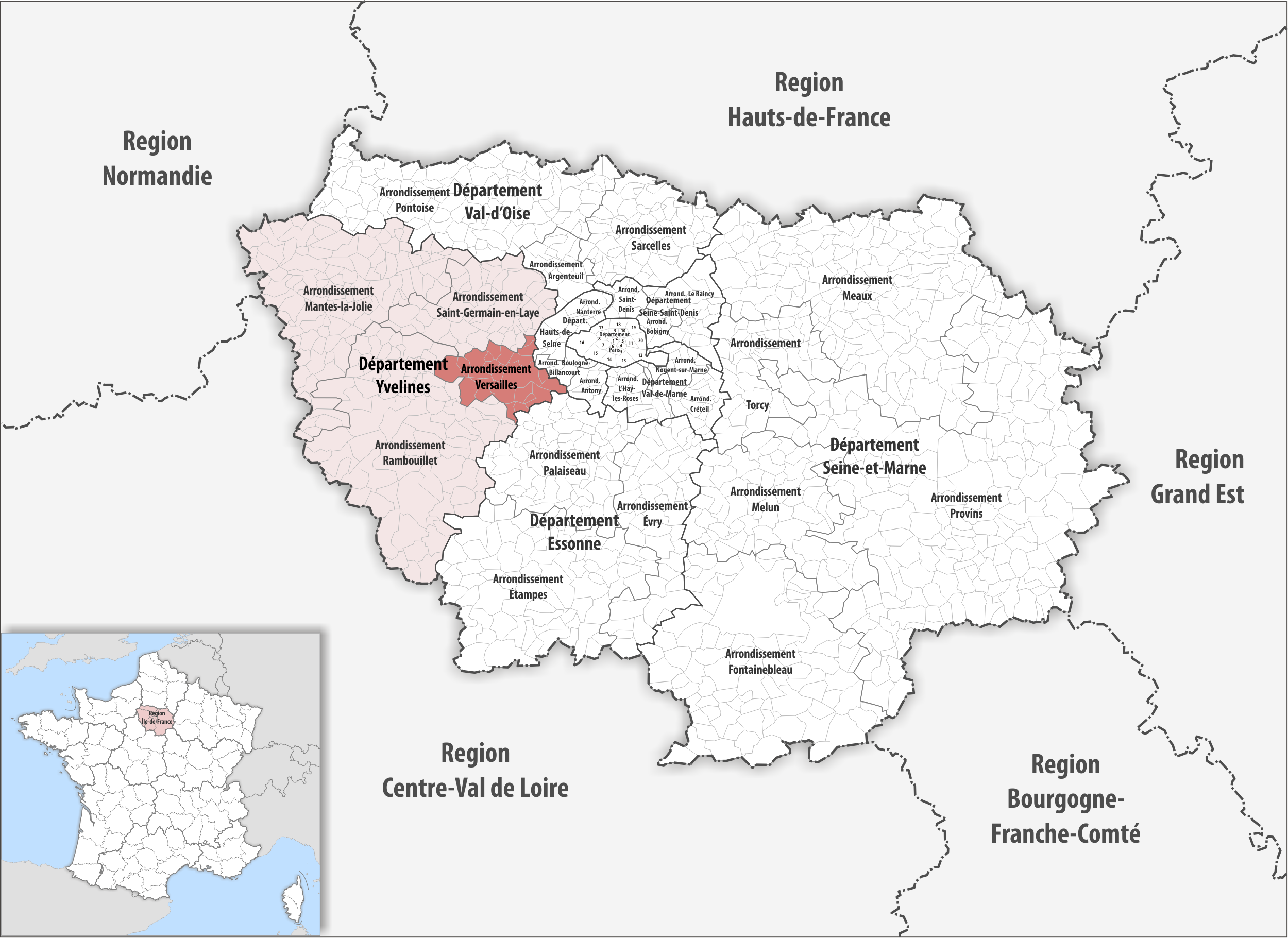 Lage des Arrondissements Versailles